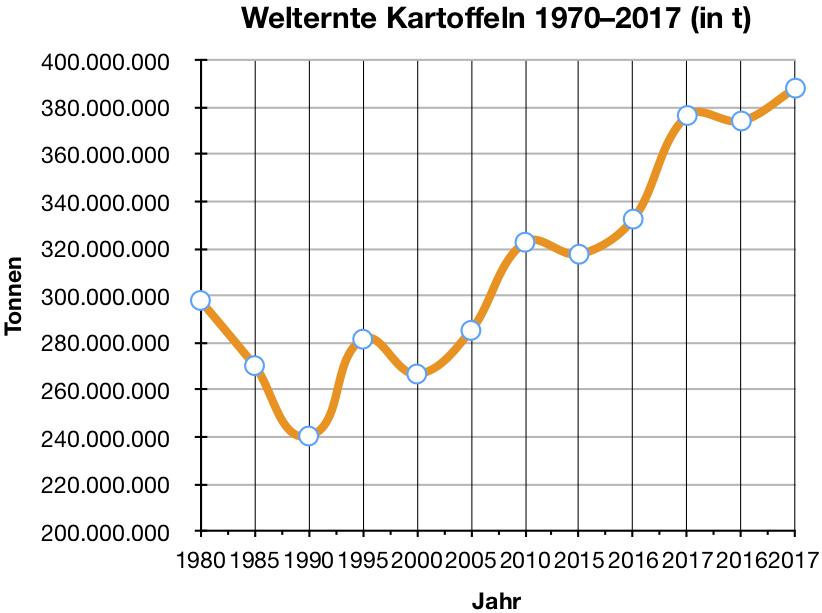 Diagramm der Welternten von Kartoffeln von 1970–2017 (in t)